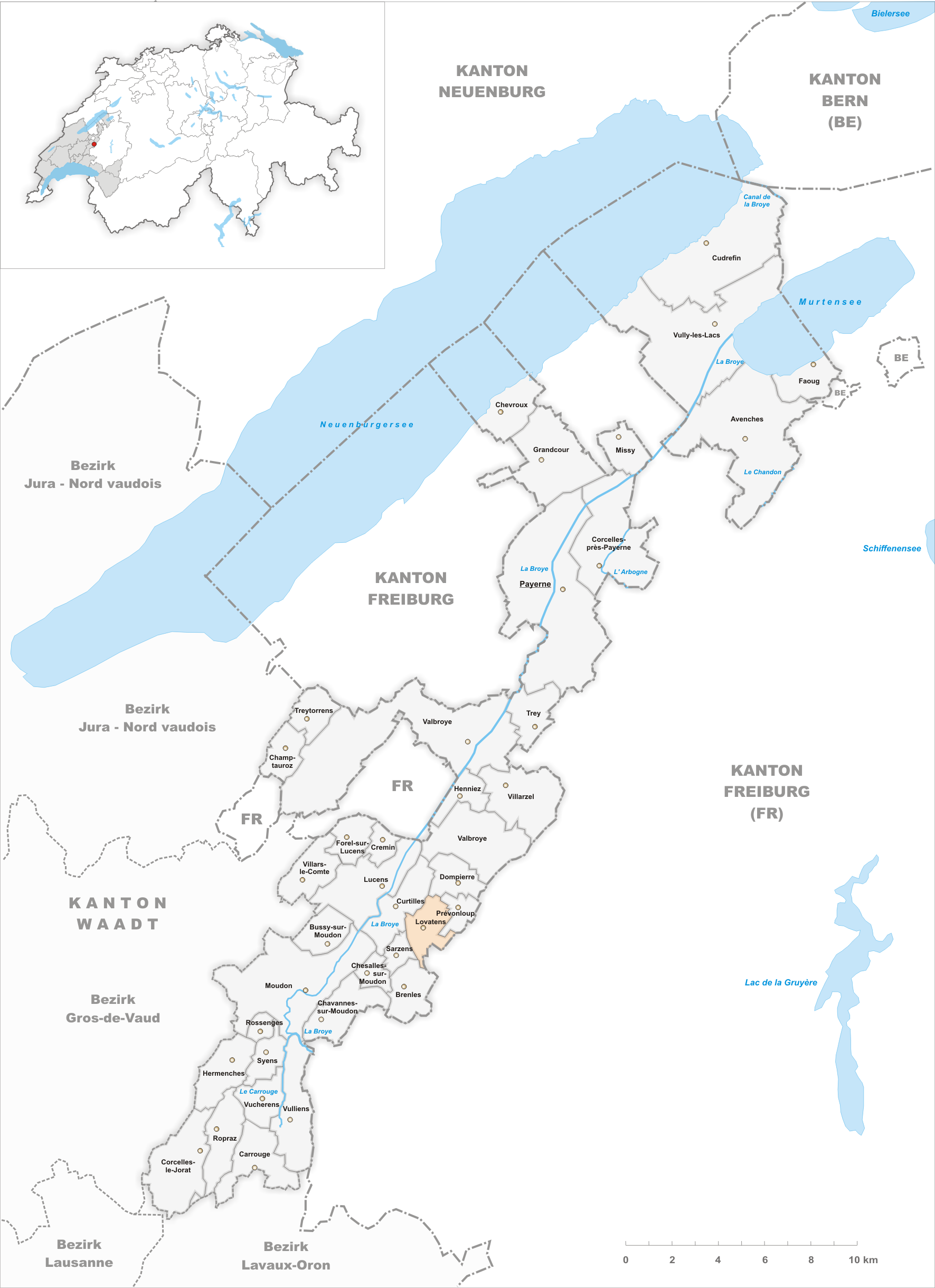 Municipality Lovatens